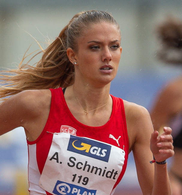 400 metres hurdles,400-Meter-Hürdenlauf,Alica Schmidt,DLV,Deutsche Leichtathletik Meisterschaften 2018,Deutscher Leichtathletik-Verband,Max-Morlock-Stadion,SC Potsdam